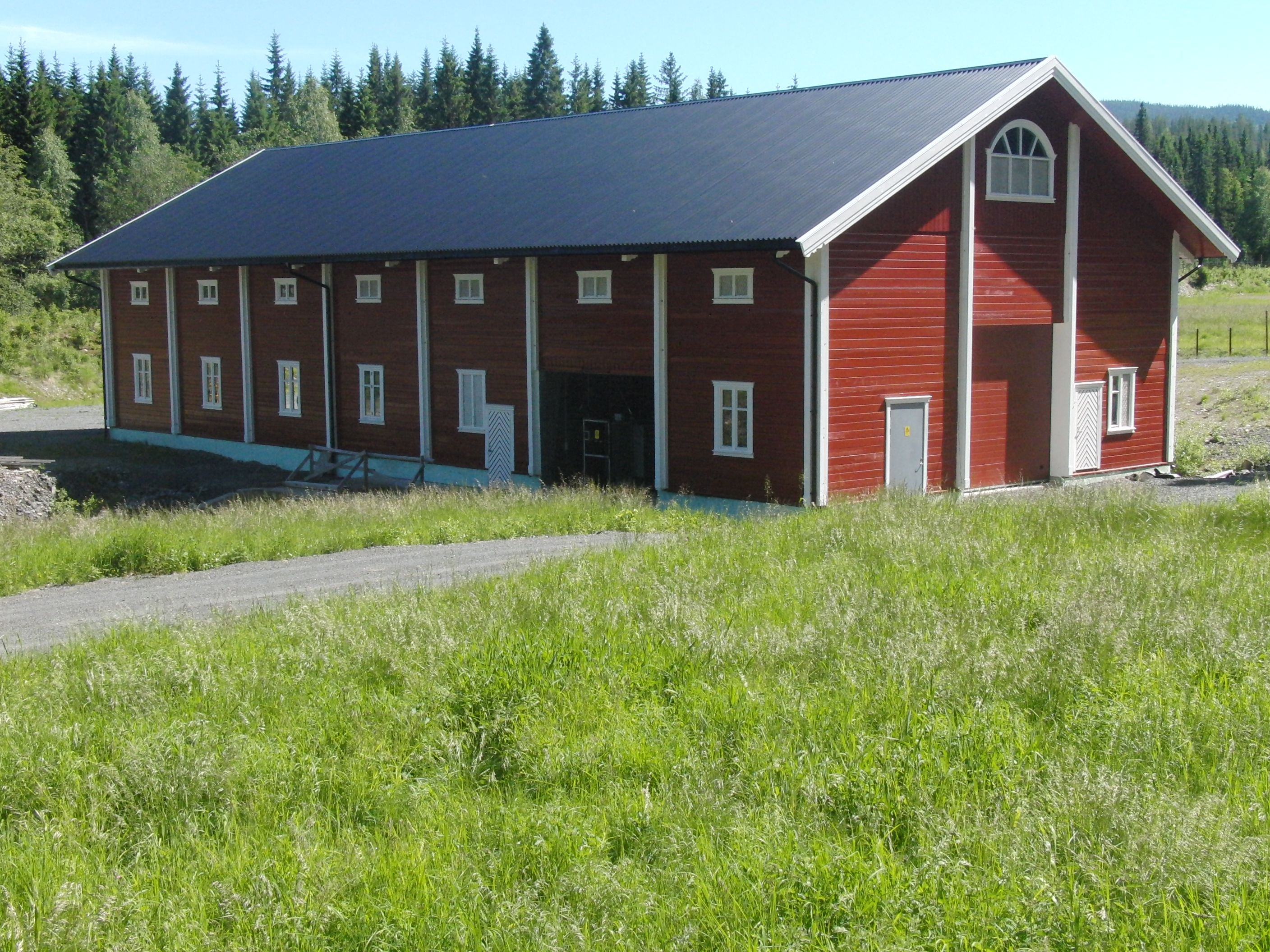 Veslefallet kraftverk